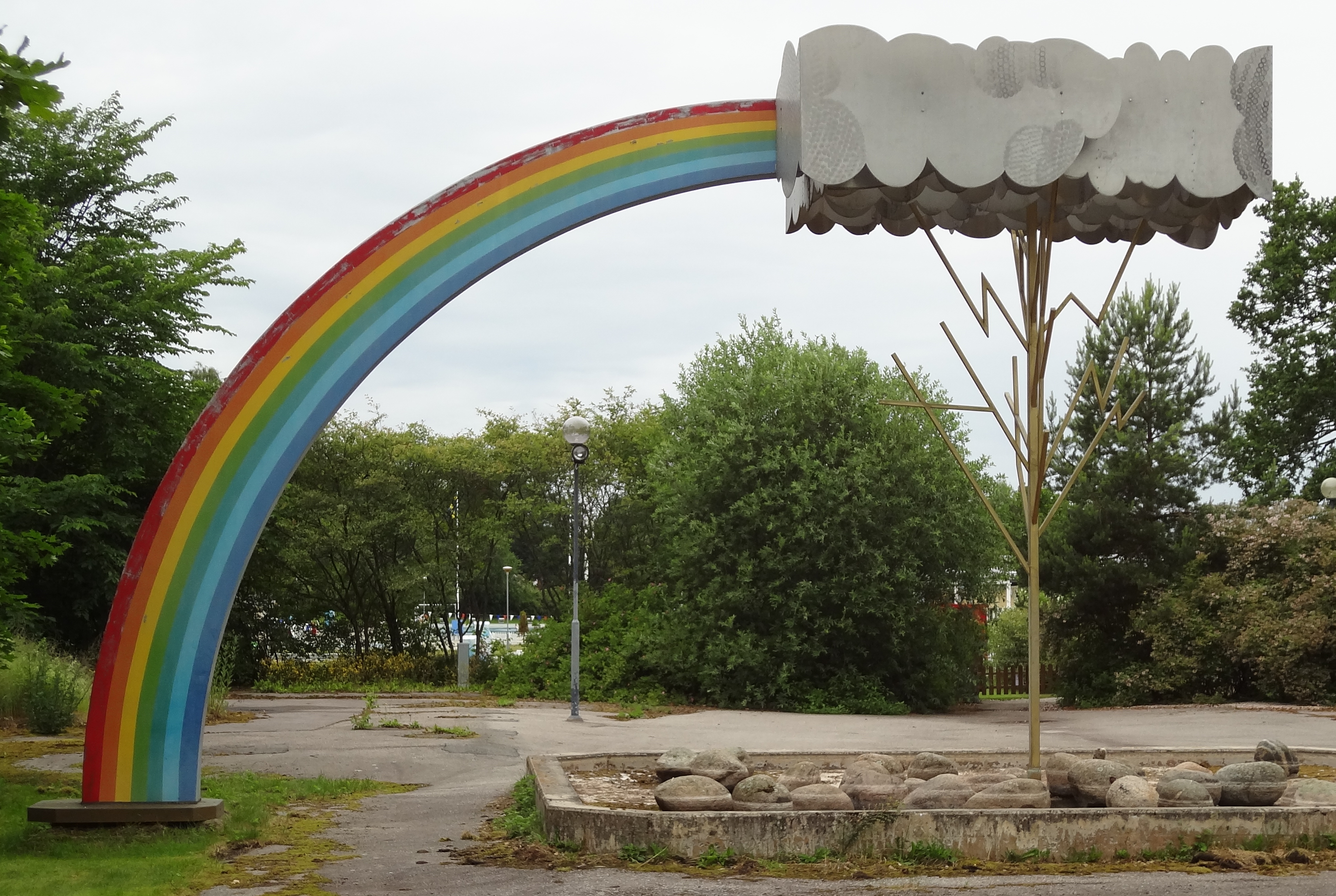 "Regnbåge", av Lars Hofsjö, placerad i Parken Zoo i Eskilstuna.